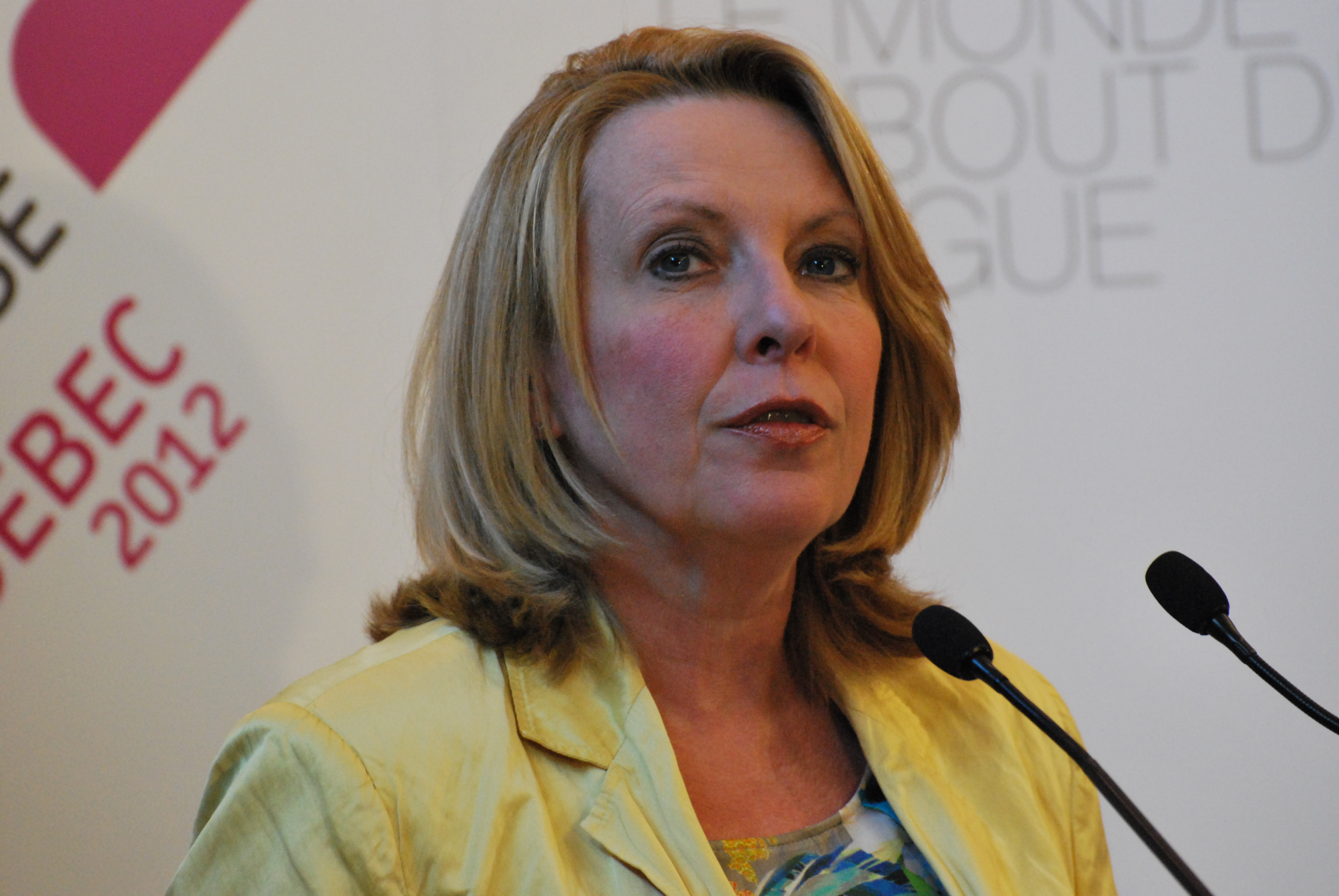 Christine St-Pierre au Forum mondial de la langue française.